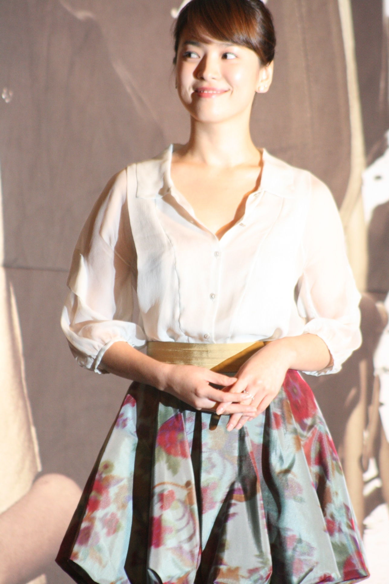 사진 156